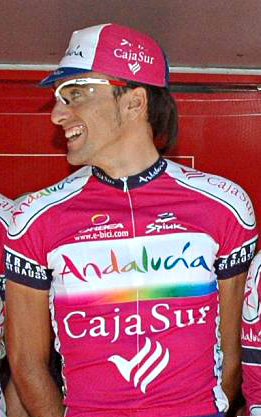 Luis Ángel Maté. Andalucía-Cajasur, Euskal Bizikleta 2008